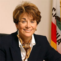 Anna Eshoo, U.S. Congresswoman.